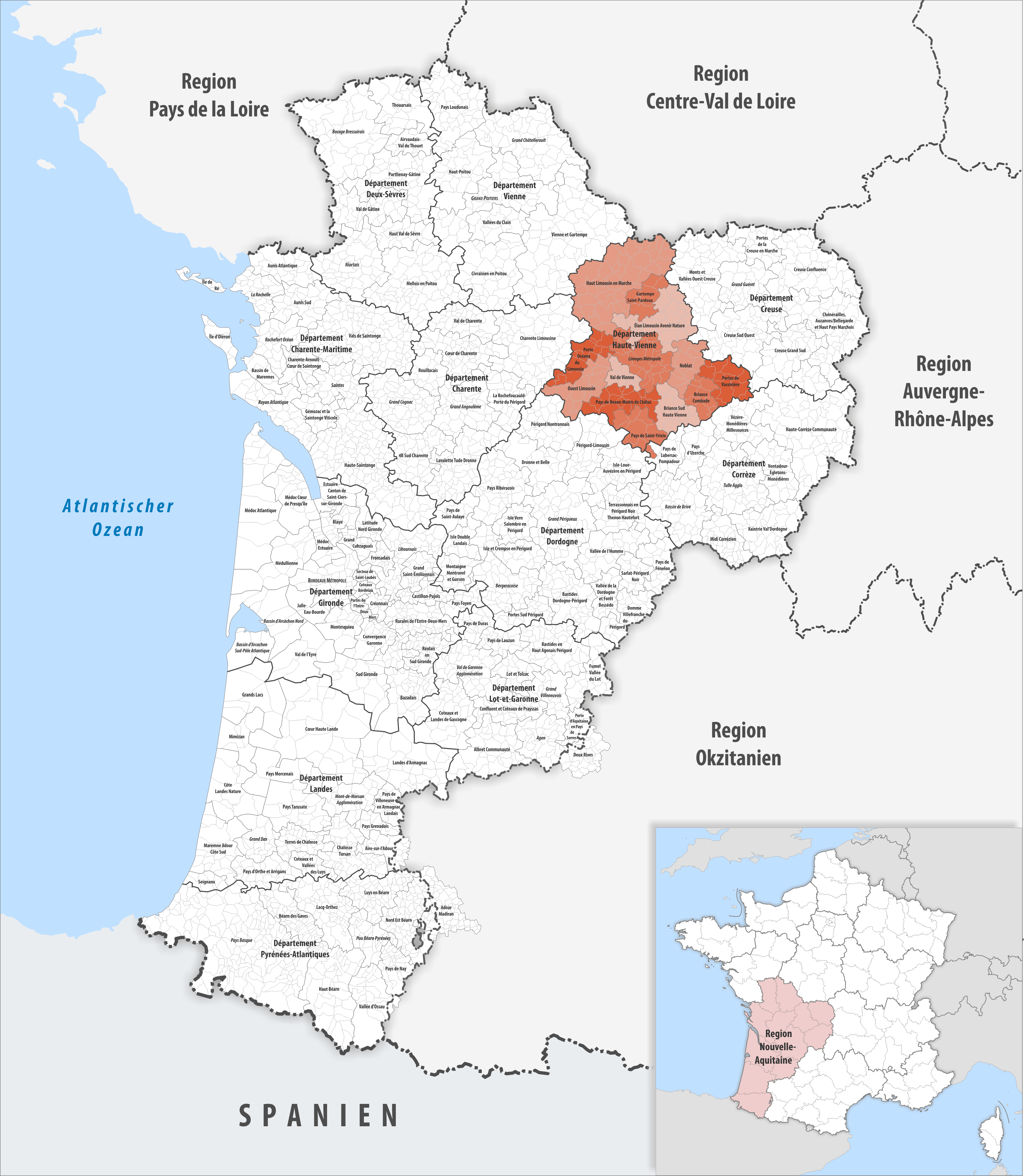 Gemeindeverbände im Département Haute-Vienne